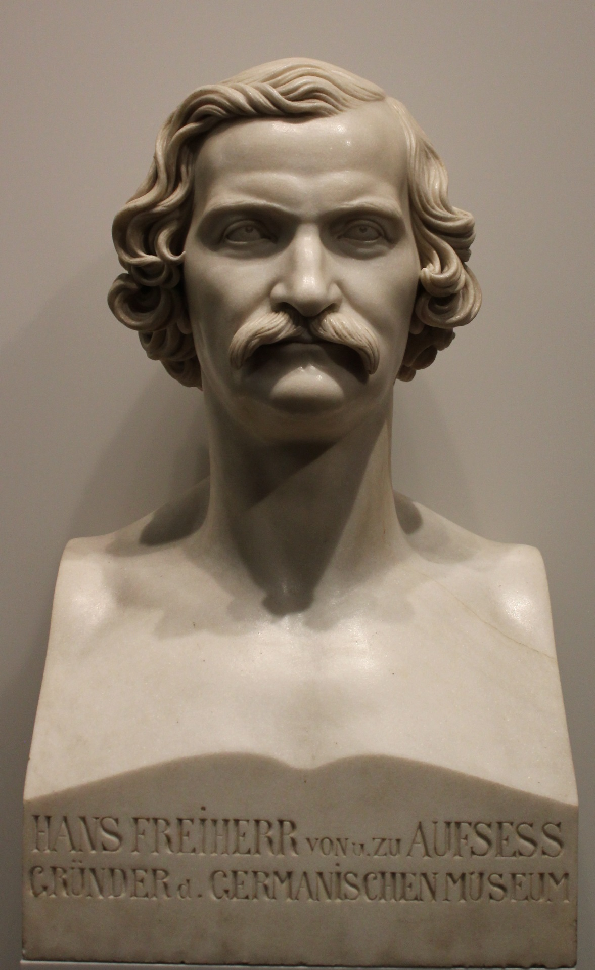 Porträtbüste des Hans von und zu Aufseß. Angefertigt von Arnold Hermann Lossow (1805-1874). Im Jahr 1867 schenkte König Ludwig I. von Bayern die Büste dem Germanischen Nationalmuseum